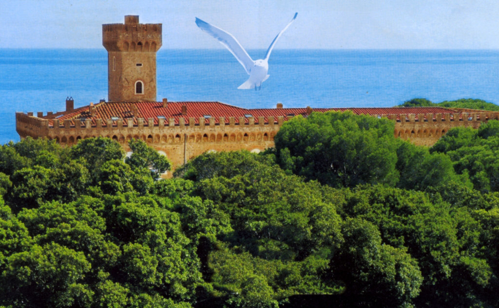 Castiglioncello (Italy, Tuscany, district of Livorno): Castello Pasquini